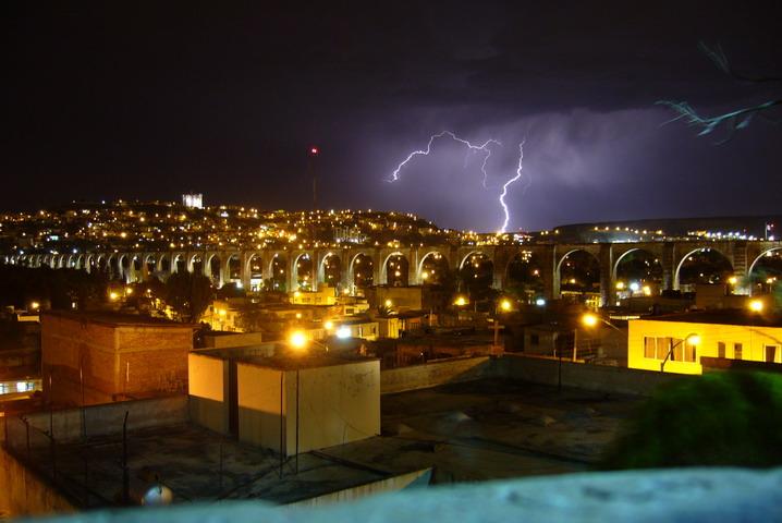 Acueducto de Querétaro en una tarde de tormenta en Santiago de Querétaro, Querétaro, México.